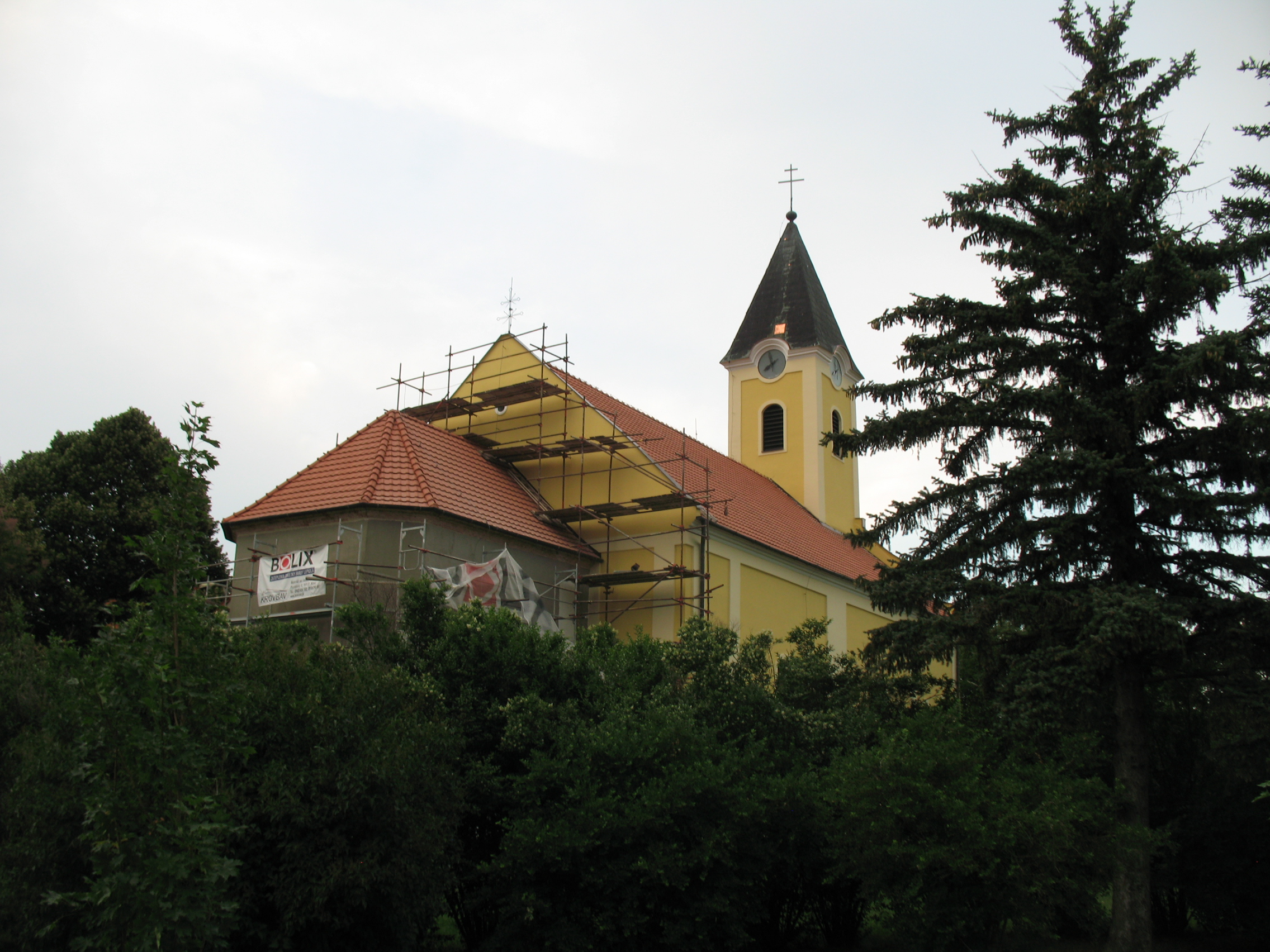 Báb község